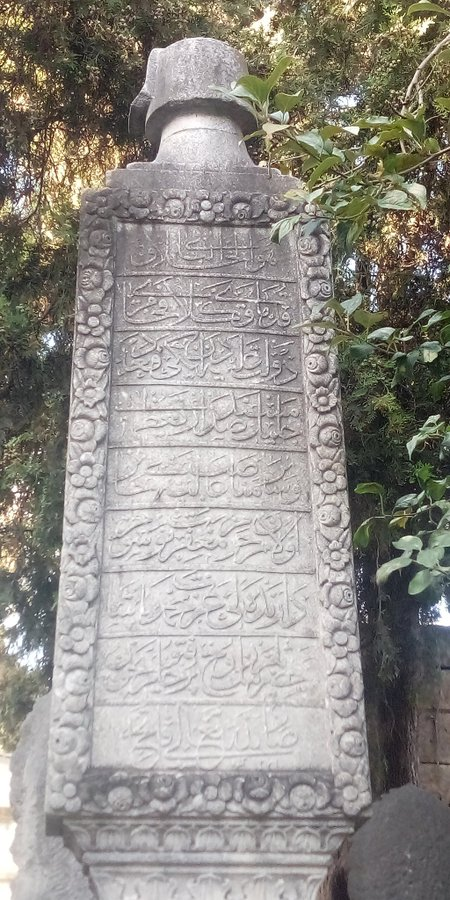 Darendeli İzzet Mehmed Paşa'nın Eyüp Sultan'da Mihrişah Valide Sultan Sıbyan Mektebi haziresinde yer alan, Hamidi Fesli Mezar Taşı.